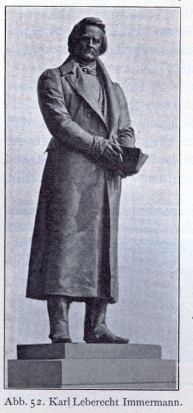 Bronzestandbild von Carl Leberecht Immermann, erschaffen von Professor Clemens Buscher in der Nische der Vorderfassade des Düsseldorfer Stadttheaters an der Alleestraße (Heinrich-Heine-Allee 16a) in Düsseldorf.jpg